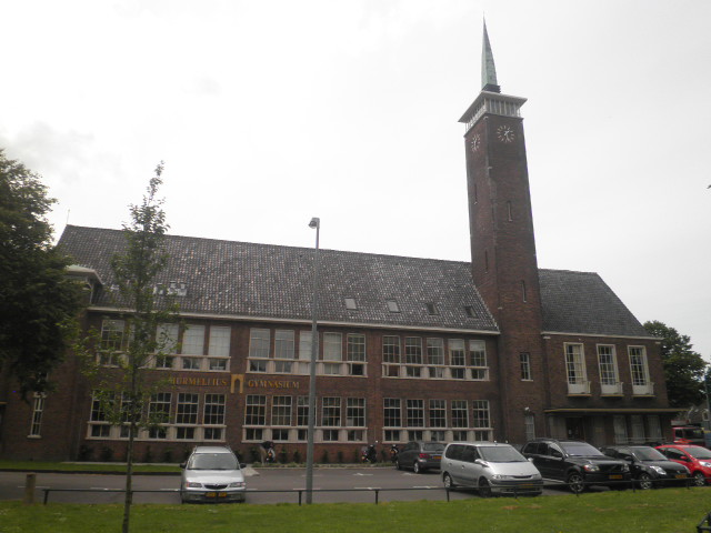 Het Murmeliusgymnasium in Alkmaar